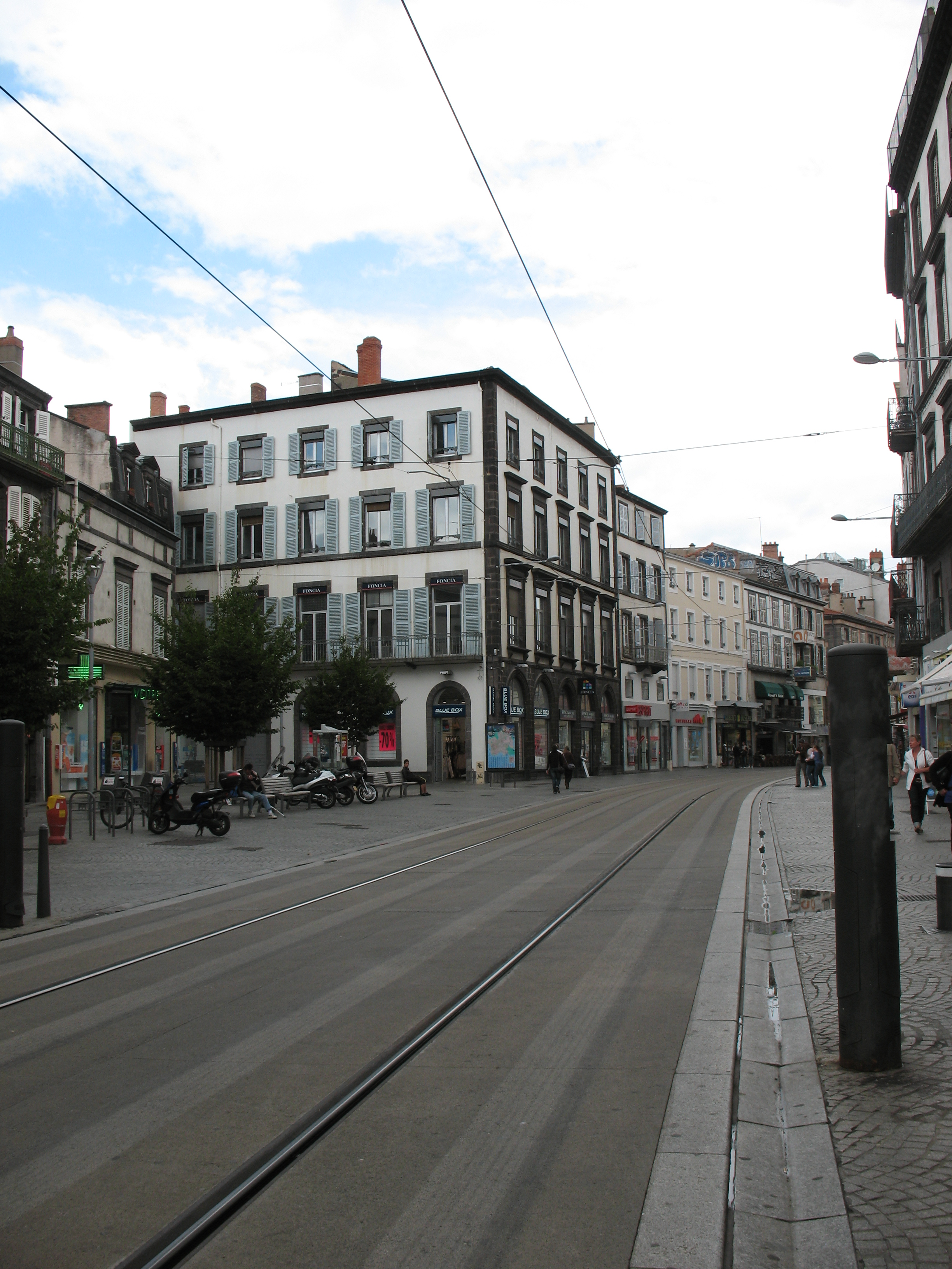 Clermont-Ferrand, France. Avenue des États-Unis, en direction de la place Gaillard.